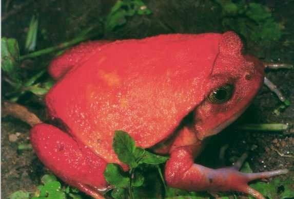 Dyscophus antongilii